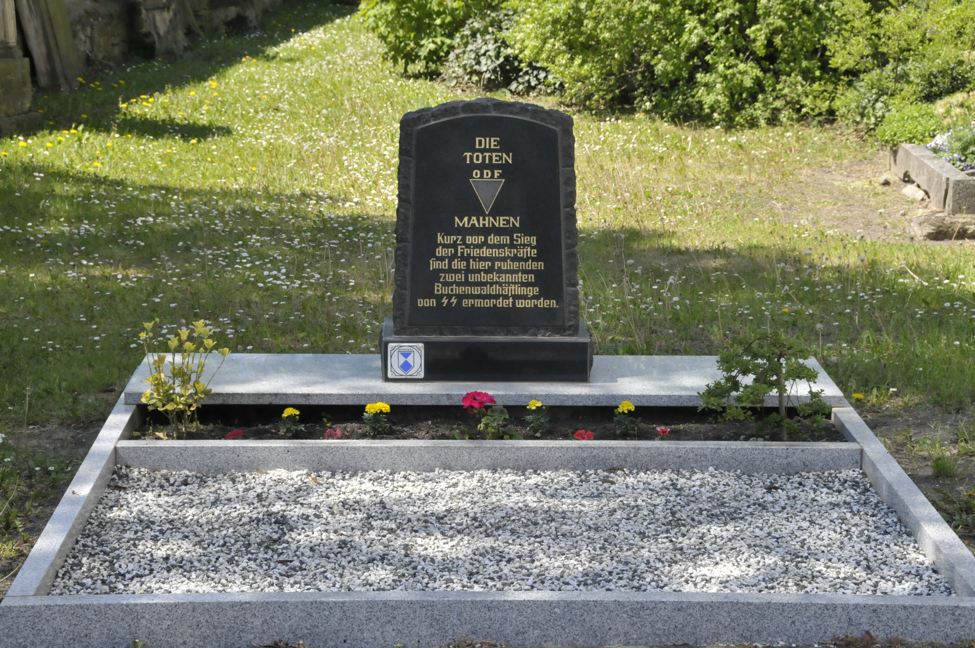 Udestedt, Grabmal für 2 KZ-Häftlinge